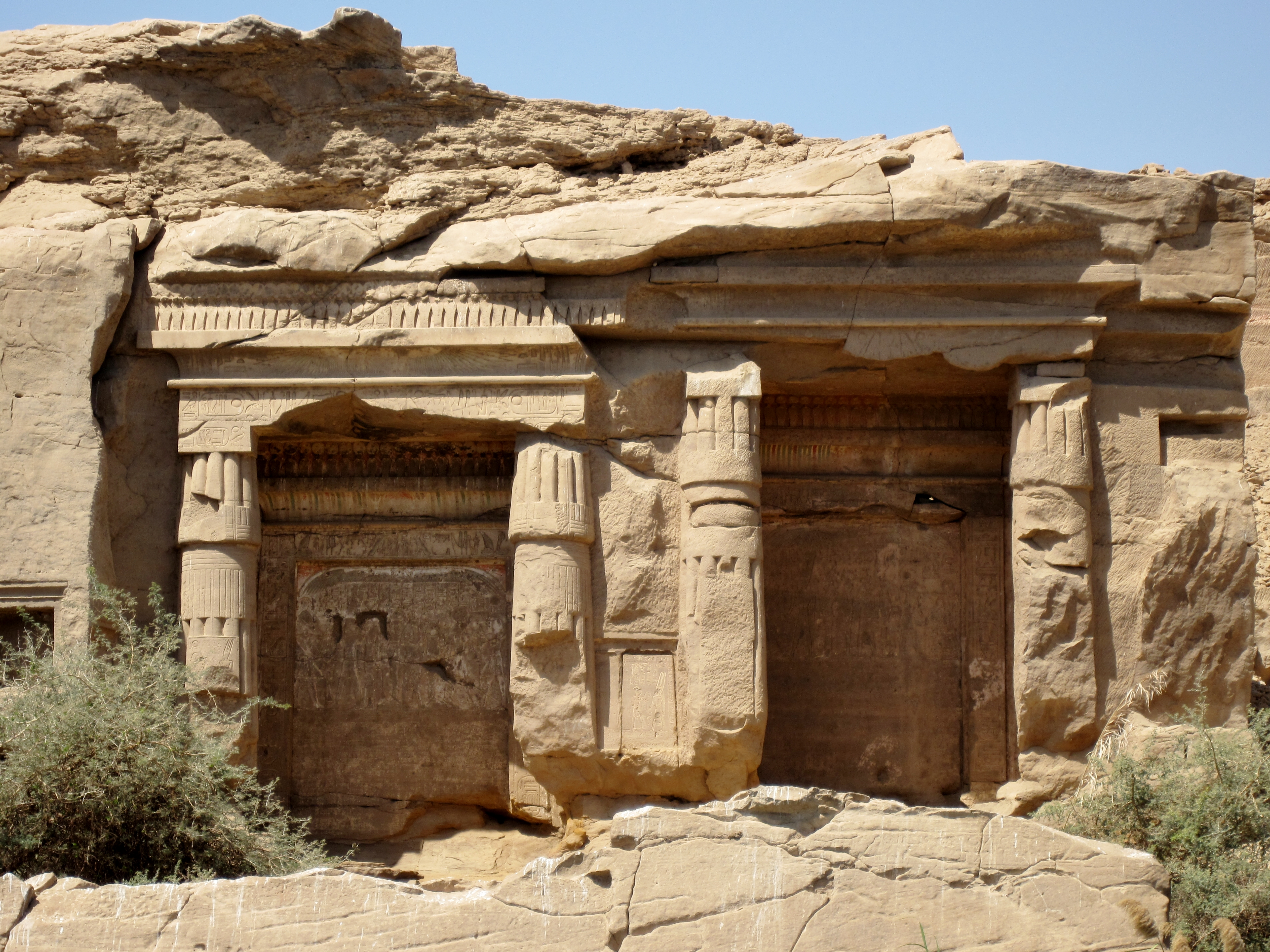 Steinbruch Dschabal as-Silsila an der Westseite des Nil nördlich von Kom Ombo, Ägypten